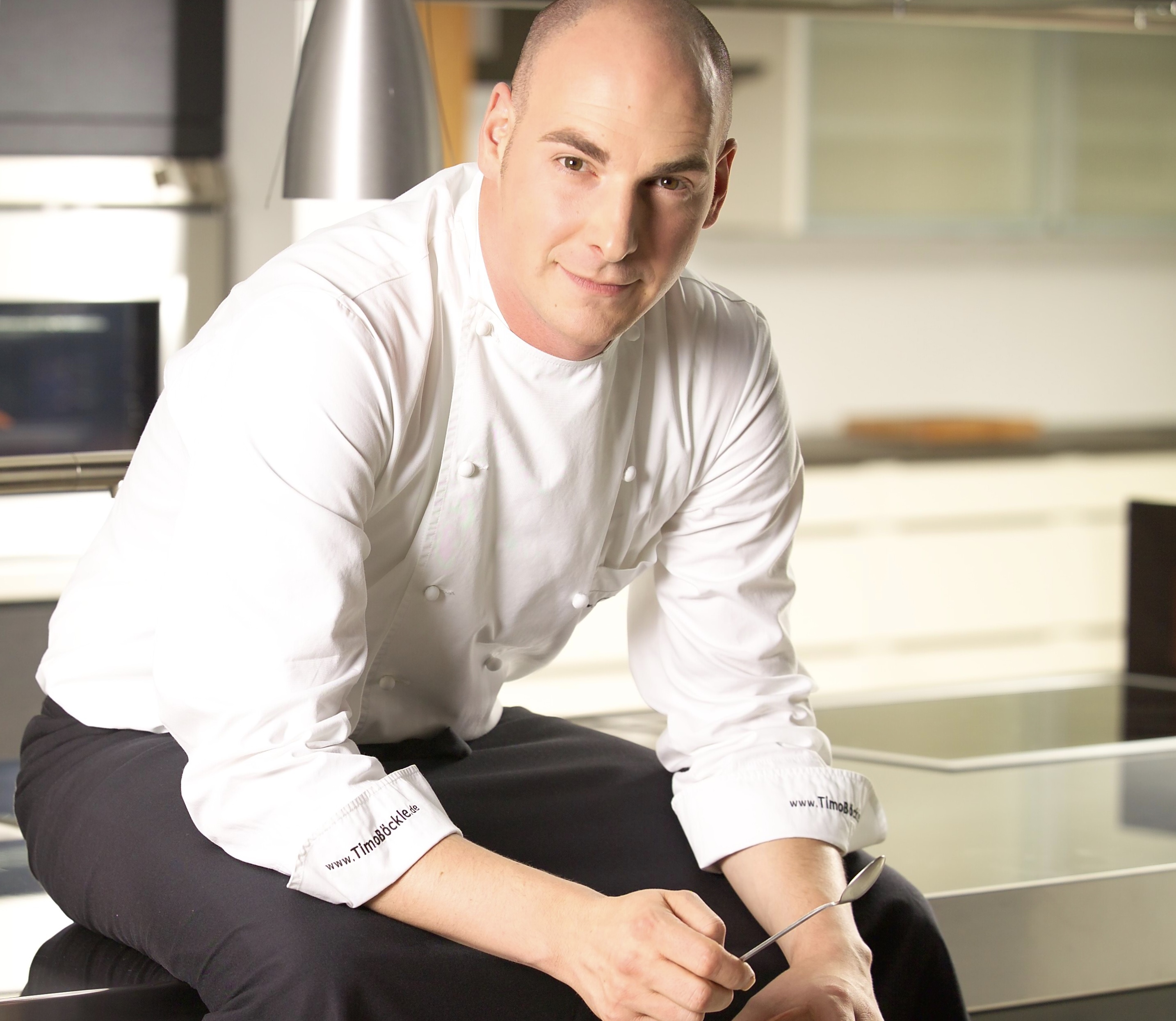 Küchenmeister